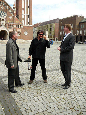 José Cura operaénekes (középen) és Botka László polgármester (jobbra) a szegedi dómnál